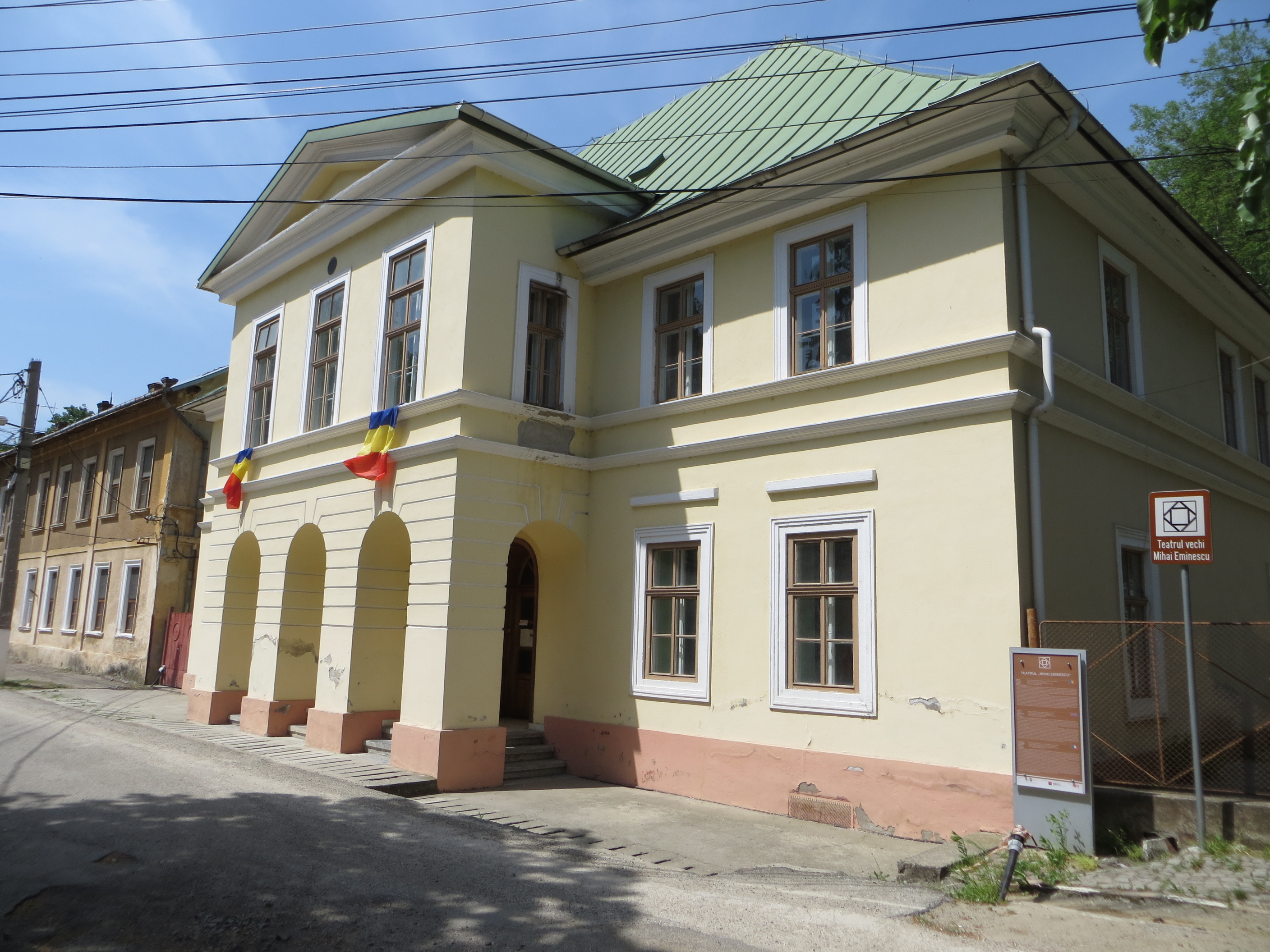 Teatrul vechi, azi Teatrul "Mihai Eminescu", a fost primul teatru românesc apărut, în 1817